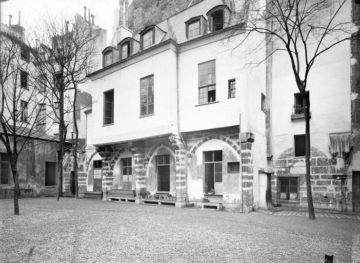 Cloître, extérieur,avant restauration